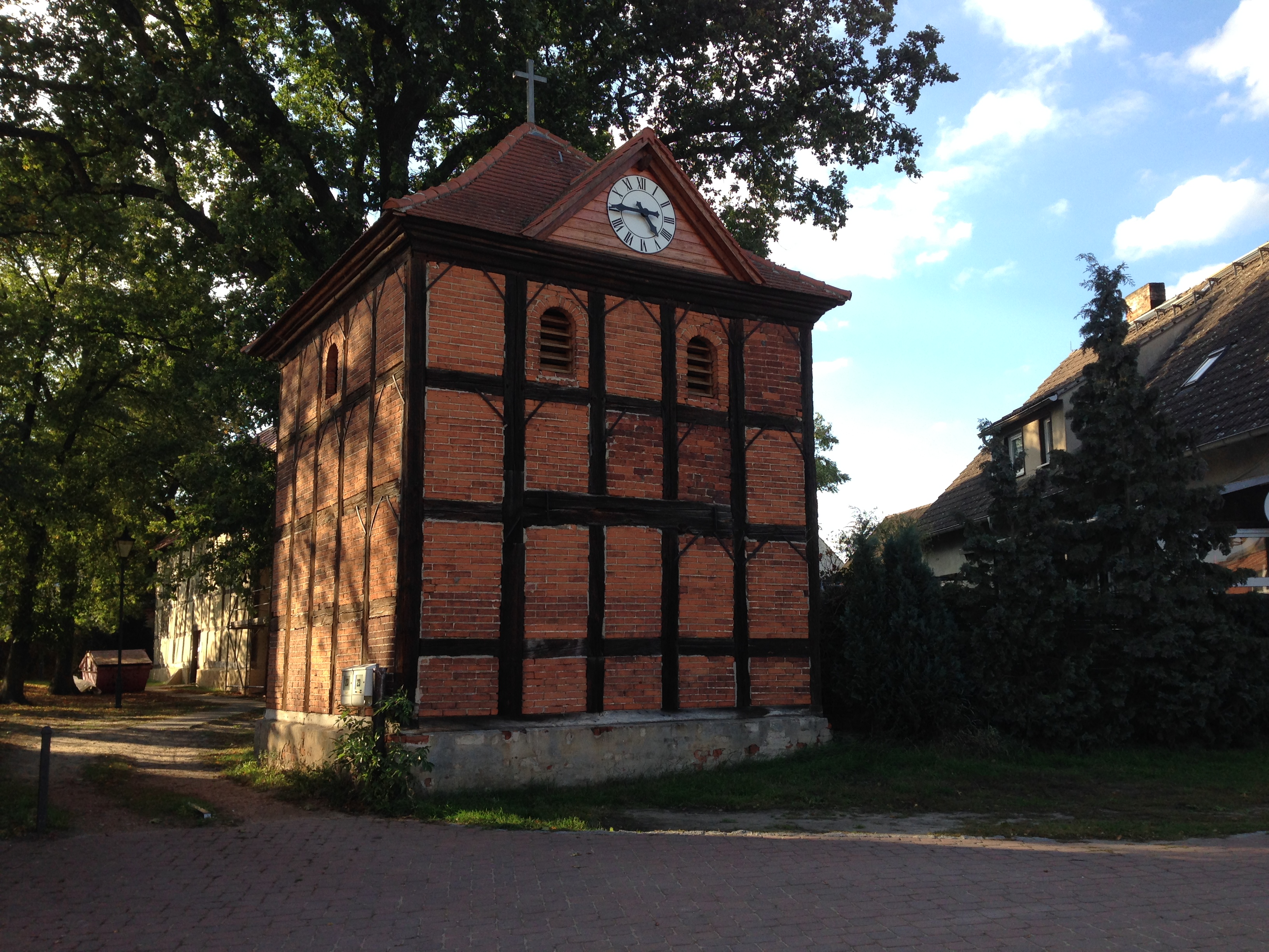 Dorfkirche Schlagenthin, Glockenschauer 2013, Ansicht von Osten - im Hintergrund rechts die Kirche